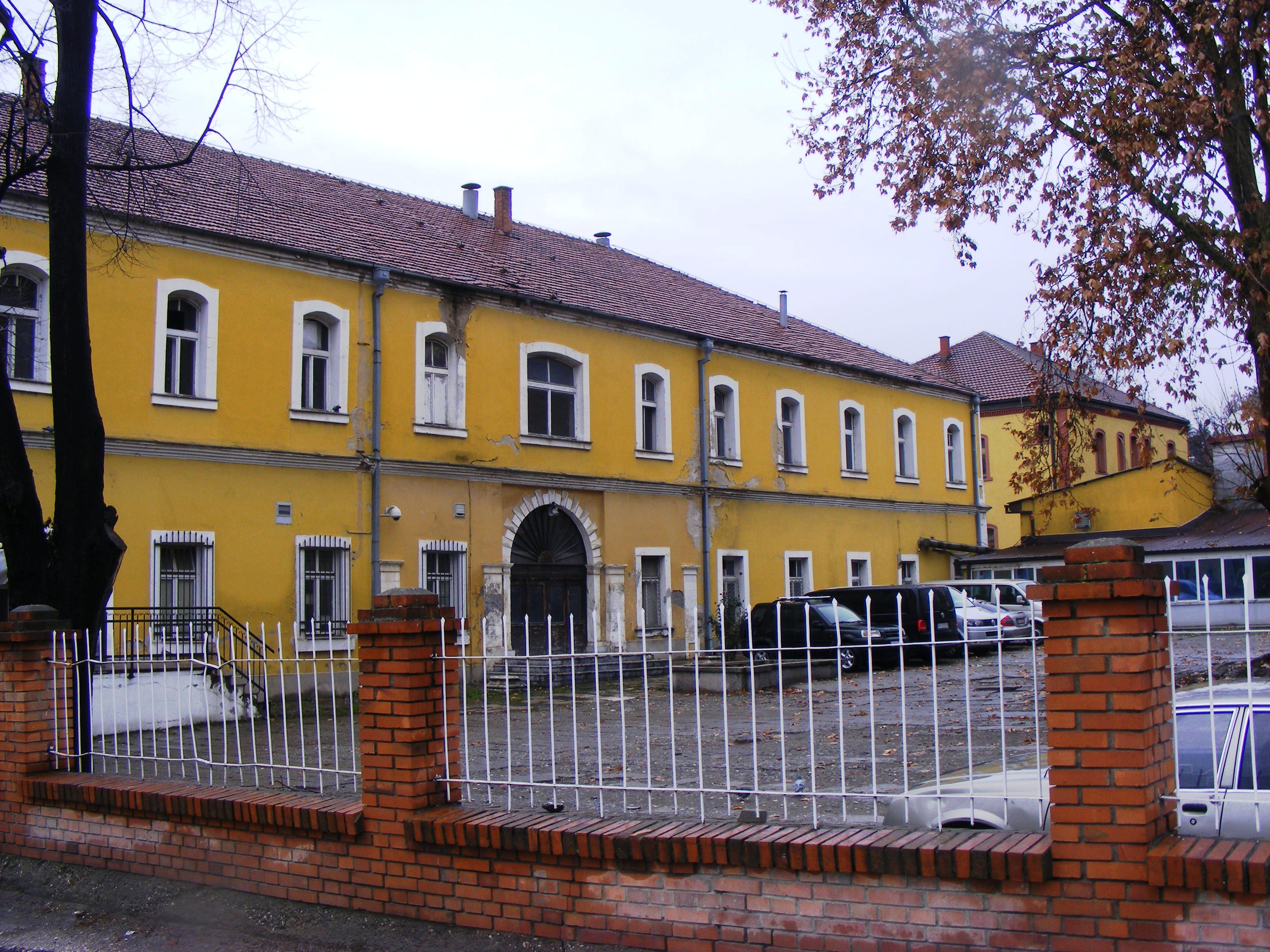 Selia e Vilajetit të Kosovës në Shkup